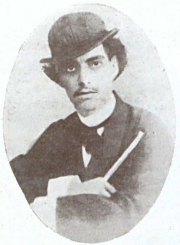 Fotografia do poeta brasileiro Antônio Frederico de Castro Alves, quando aluno da Faculdade de Direito do Recife (publicada no primeiro número da revista carioca "Bahia Illustrada").